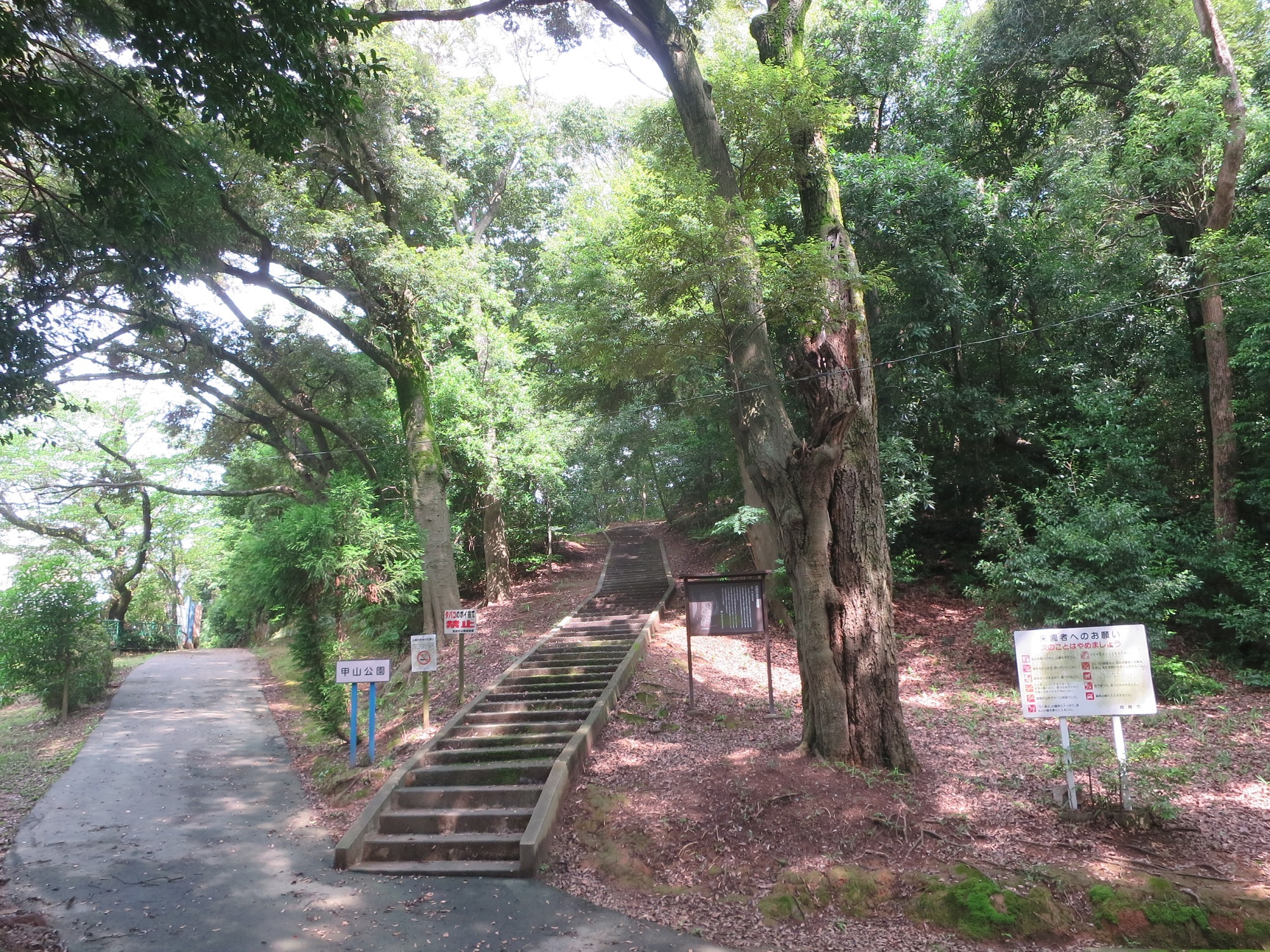 岡崎市六供町、甲山（かぶとやま）